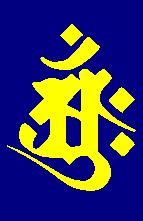 Tập tin hình ảnh này do chính người post tạo ra và đưa vào sử dụng công cộng.